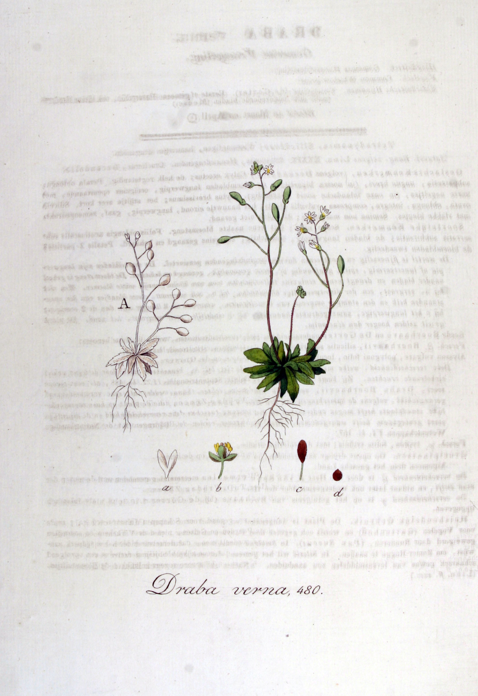 Erophila verna (L.) Chevall. (Syn. Draba verna L.)